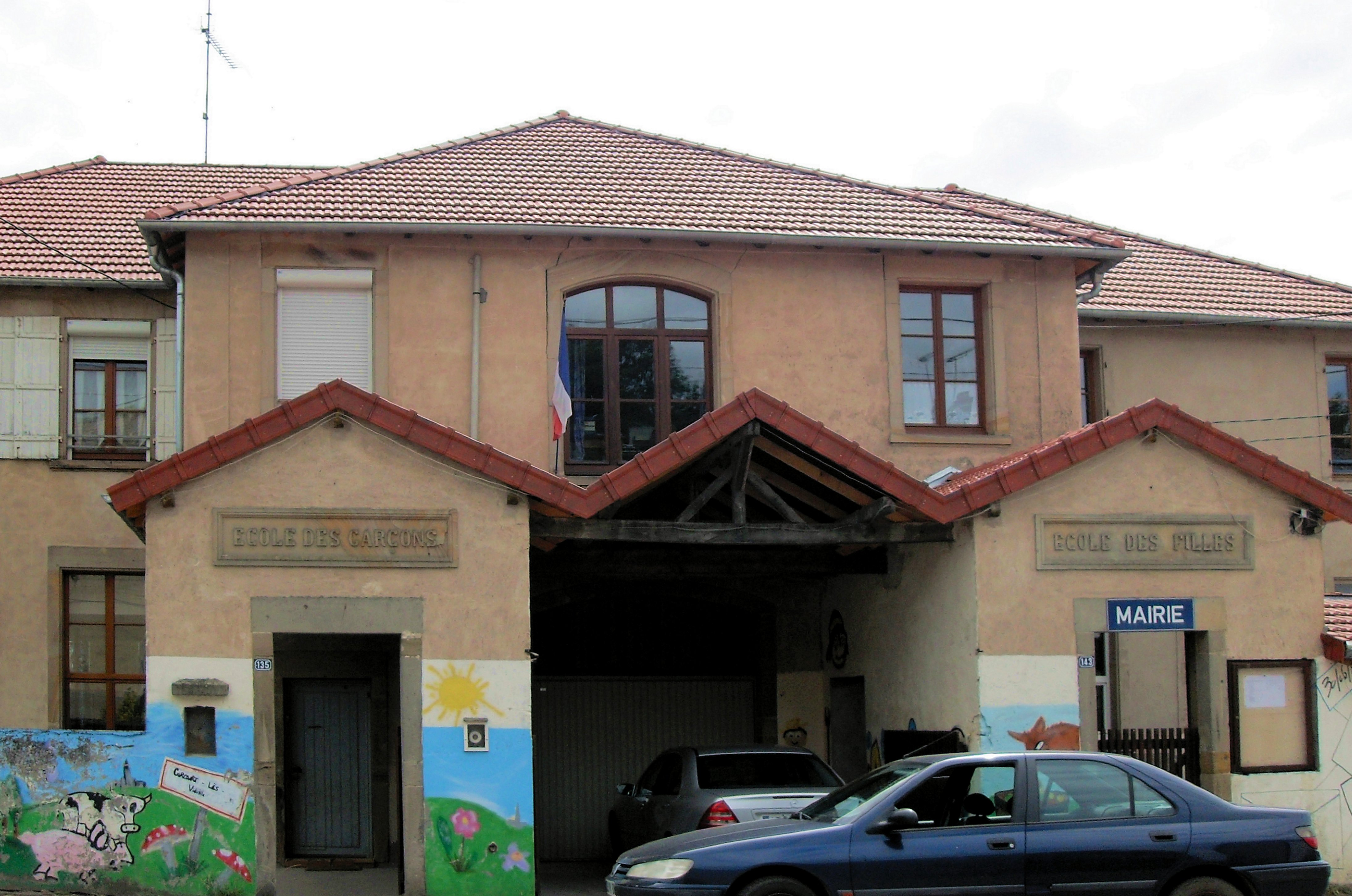 La mairie-école de Gircourt-lès-Viéville